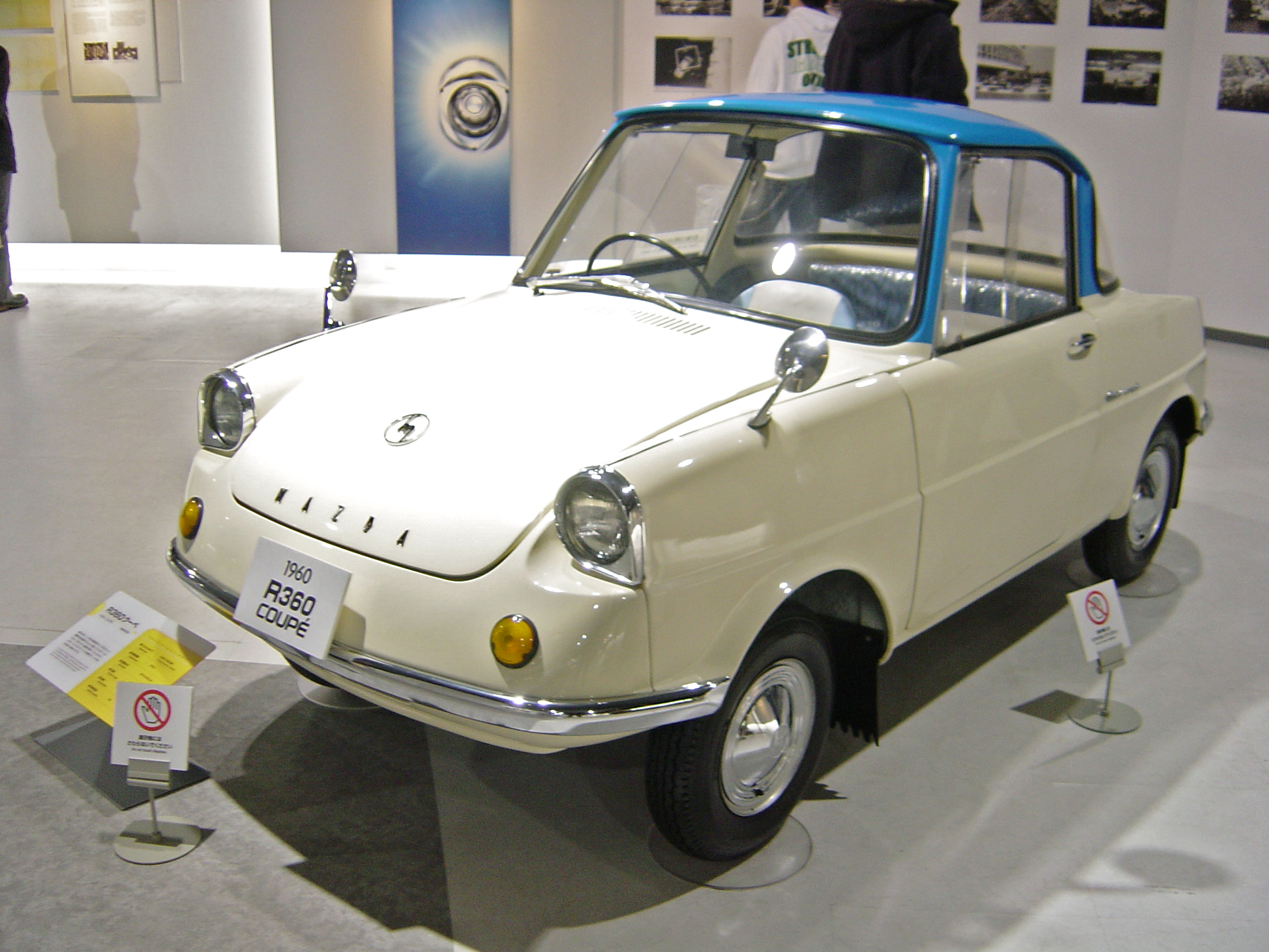 Mazda R360coupe(マツダ・R360クーペ ),Mazda Museum